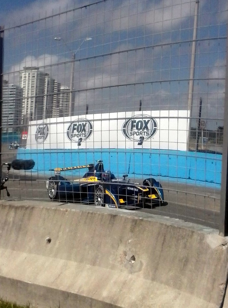 Nicolas Prost en el ePrix de Punta del Este del 2014, fecha valida por la Formula E.